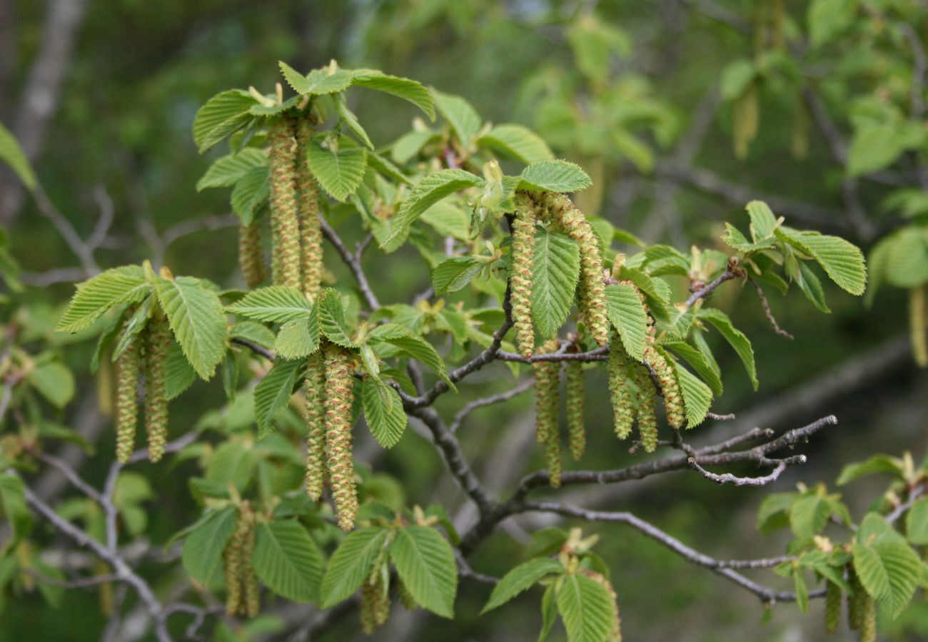 Hopfenbuche (Ostrya carpinifolia), Birkengewächse (Betulaceae) - Italien/Italia/Italy: Toscana, Prov. Lucca, Parco Regionale delle Alpi Apuane, zwischen Foce di Valli und Monte Forato